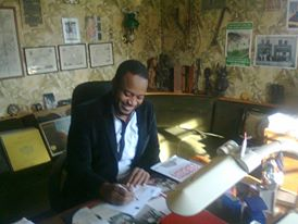 this is Chérif, guinean writer